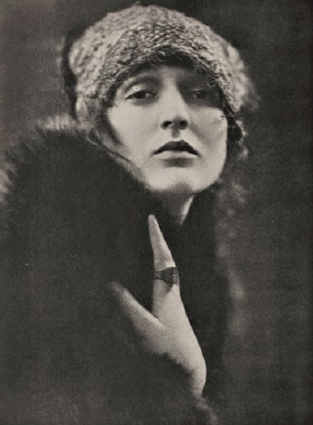 Carmel Myers